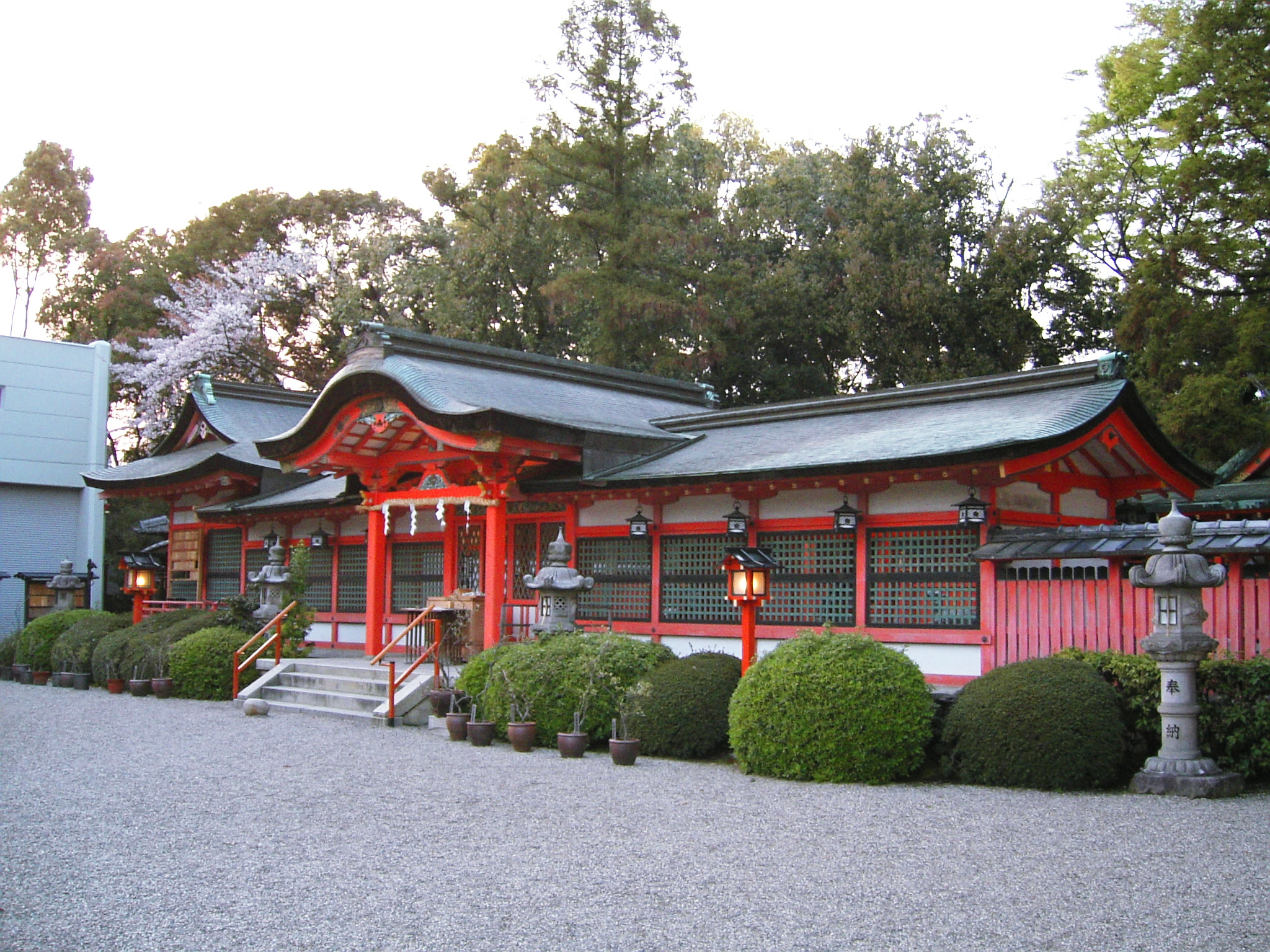 西院春日神社本殿（京都市右京区）